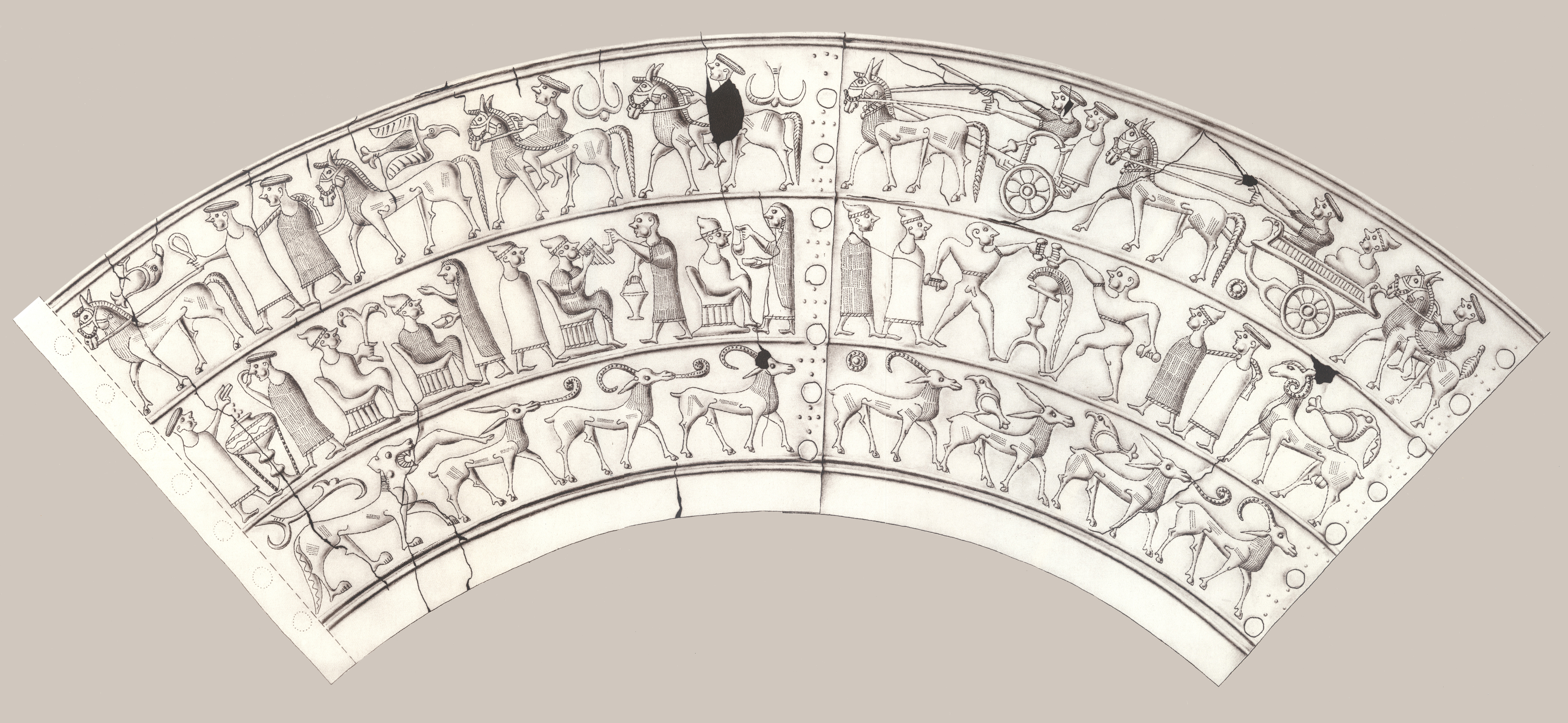 Plašč vaške situle.